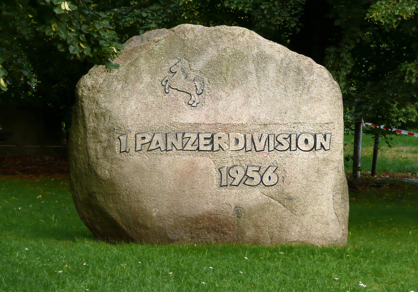 Gedenkstein 1. Panzerdivision